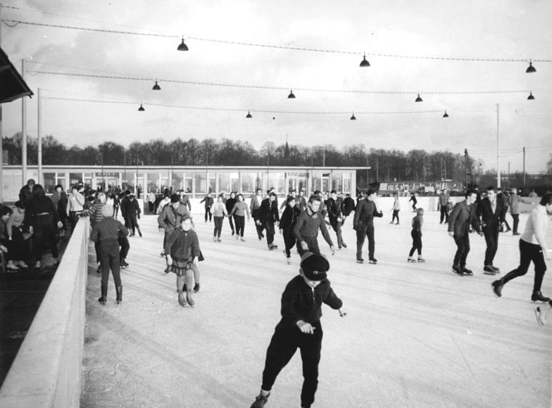 Berlin, Dynamo-Sportforum, Eisstadion Zentralbild Drossel 20.11.1960 Eisstadion gut besucht Das Eisstadion im Dynamo-Sportforum in Berlin-Hohenschönhausen war am Sonntag, dem 20.11.1960, Anziehungspunkt vieler Eissportler. Das Eisstadion wurde an diesem Sonntag erstmalig geöffnet. UBz: Blick auf das Eisstadion.